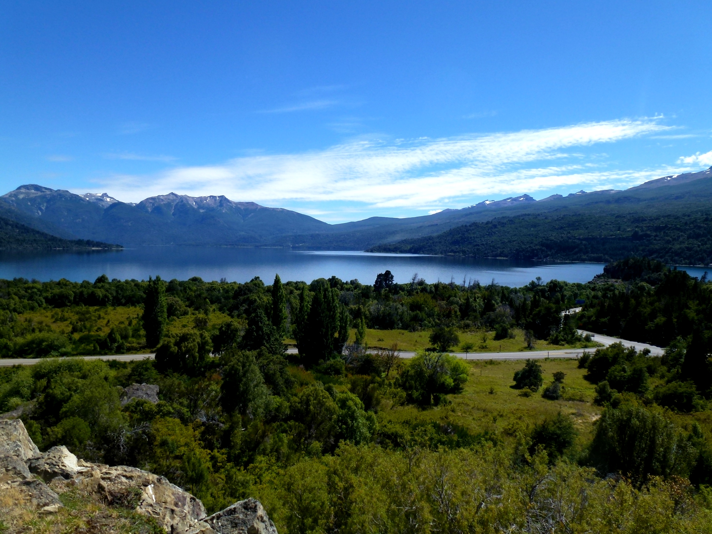 Parque Nacional Los Alerces Argentina